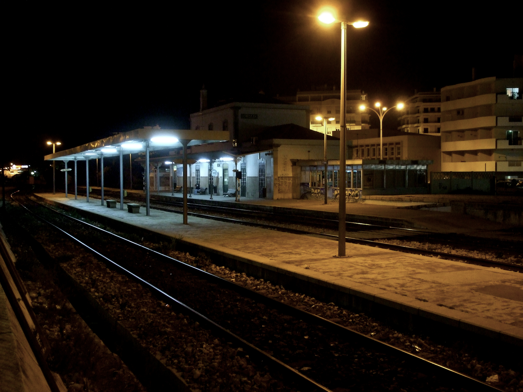 Tipo: EP (Estação) Local: Olhão [Linha do Algarve, PK 350] Data e hora: 21 de Fevereiro de 2009 [21h11]